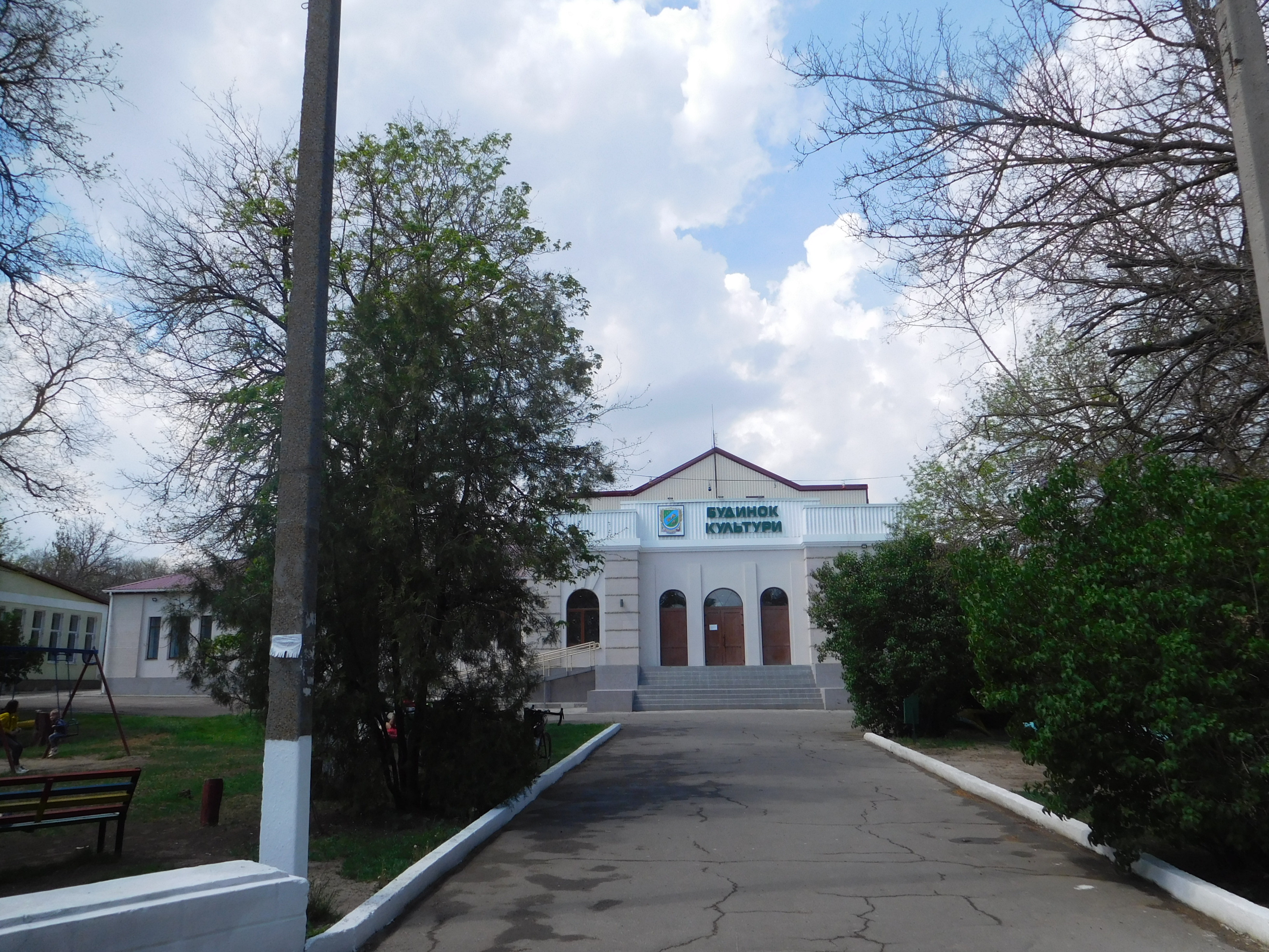 Будинок культури, смт Іванівка, Одеська область